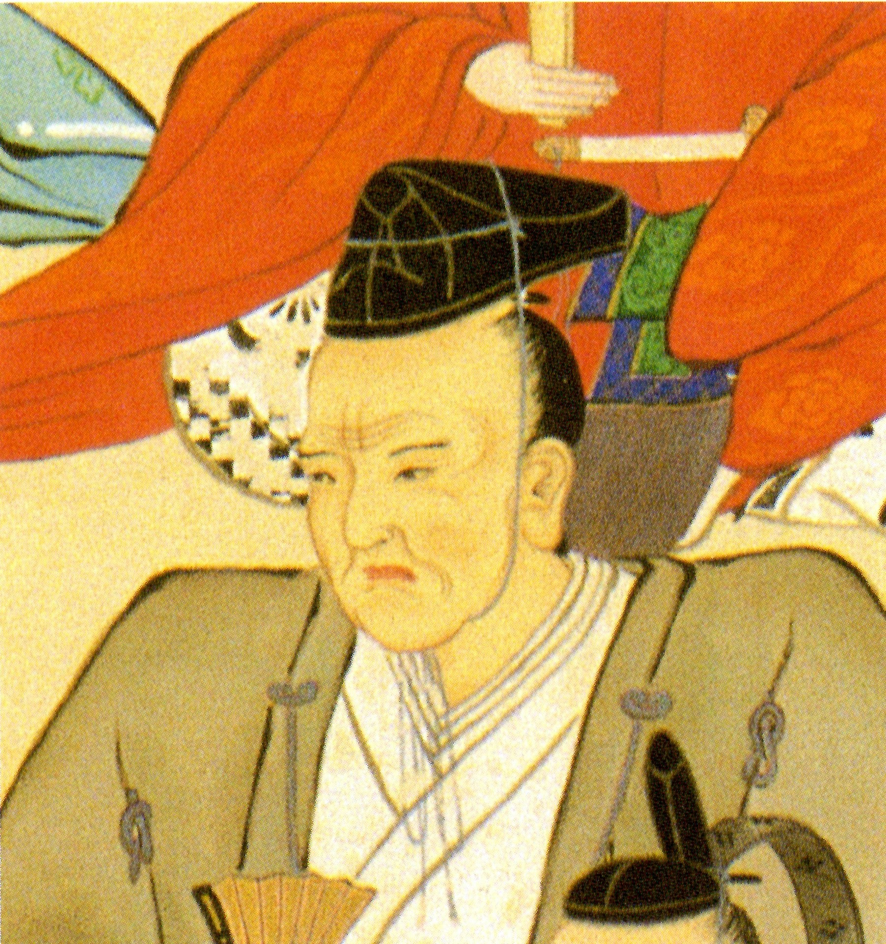 津軽信順の肖像。